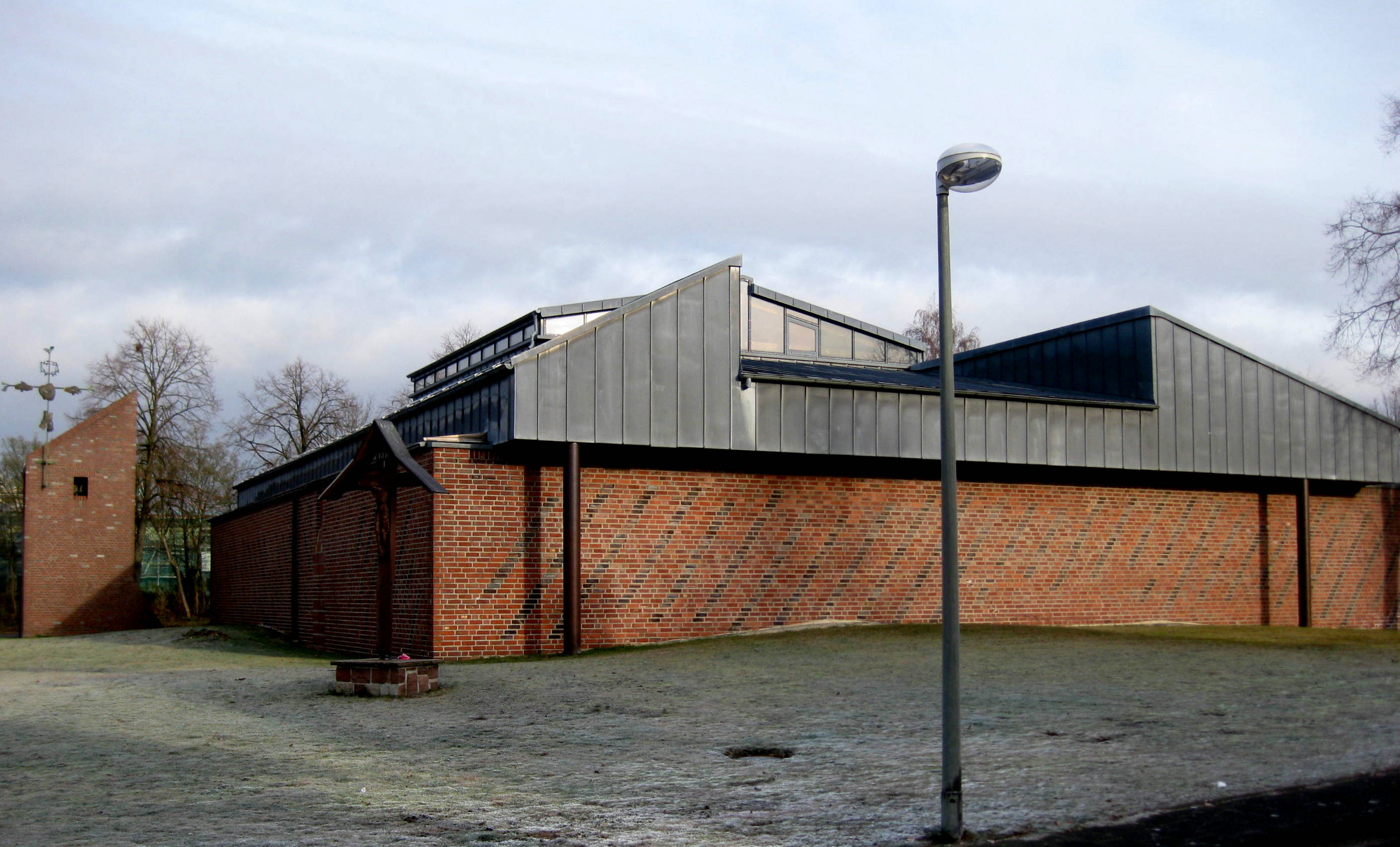 Katholisches Gemeindezentrum im Erzbistum Paderborn, 1974